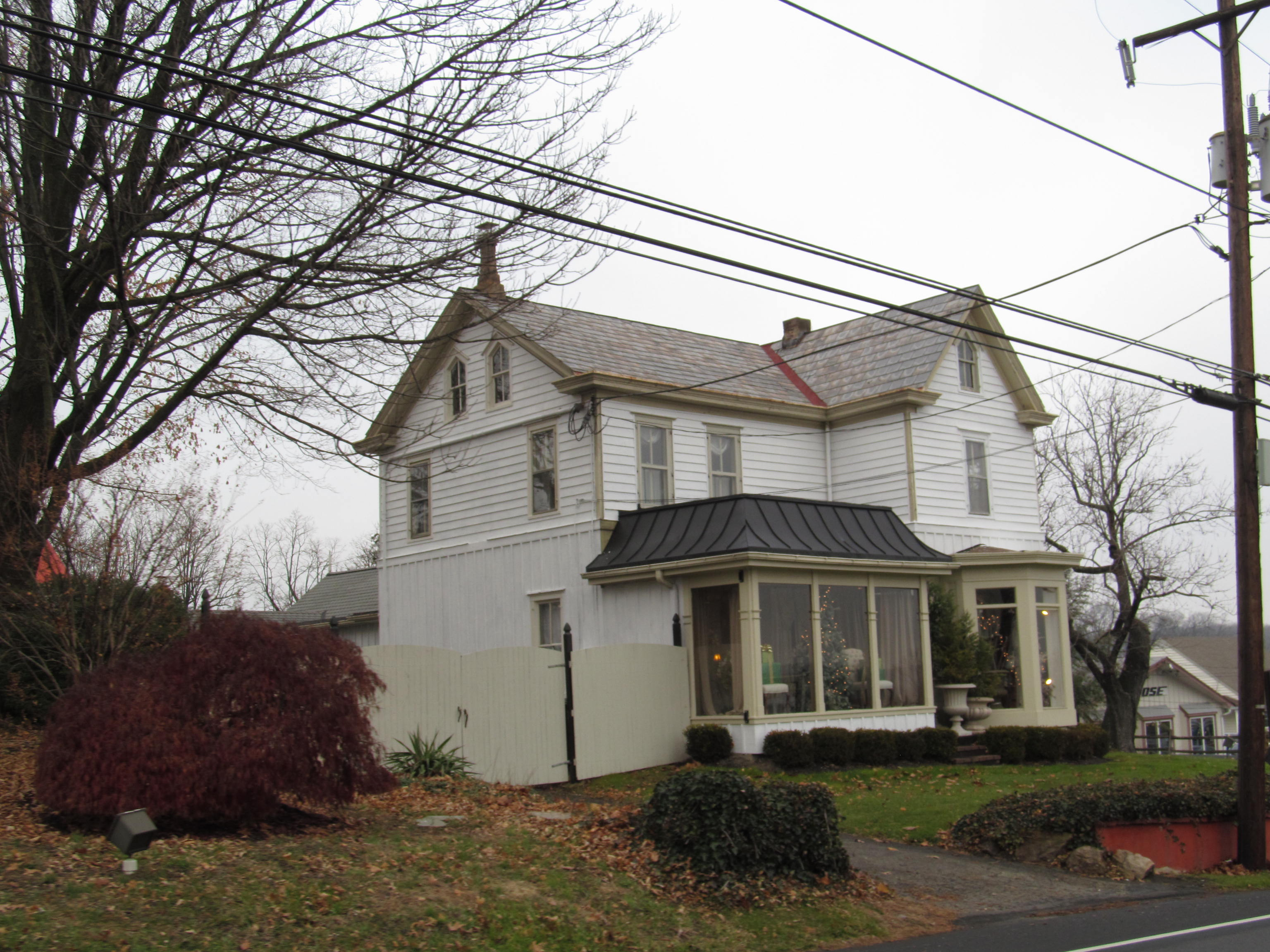 Lahaska, Pennsylvania